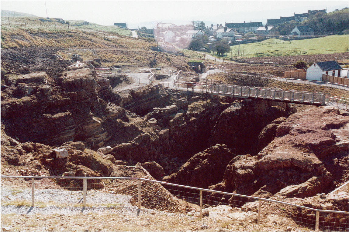 Welsh, the language of Wales first (my mother tongue); English then follows: Crynodeb Daeth llawer o gopr o Gymru, yn bennaf o Ben y Gogarth a hynny o leiaf ers ymweliad y Rhufeiniad a'r safle. Dyma'r chwarel, ger Llandudno, gogledd Cymru. Tynnwyd y llun gel i tua 2001. In brief Much copper was taken from this site as early as the Roman occupation of Wales (57 - 400 AD), and most probably before that time by the Celts. This site is on a hill named Pen y Gogarth which is around half a mile from Llandudno, north Wales. Photo taken around 2001.